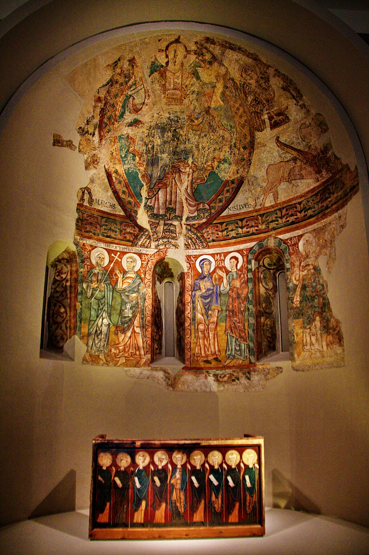 Visió global de l'absis de Sant Pere de la Seu d'Urgell amb l'altar de Tavernoles al centre